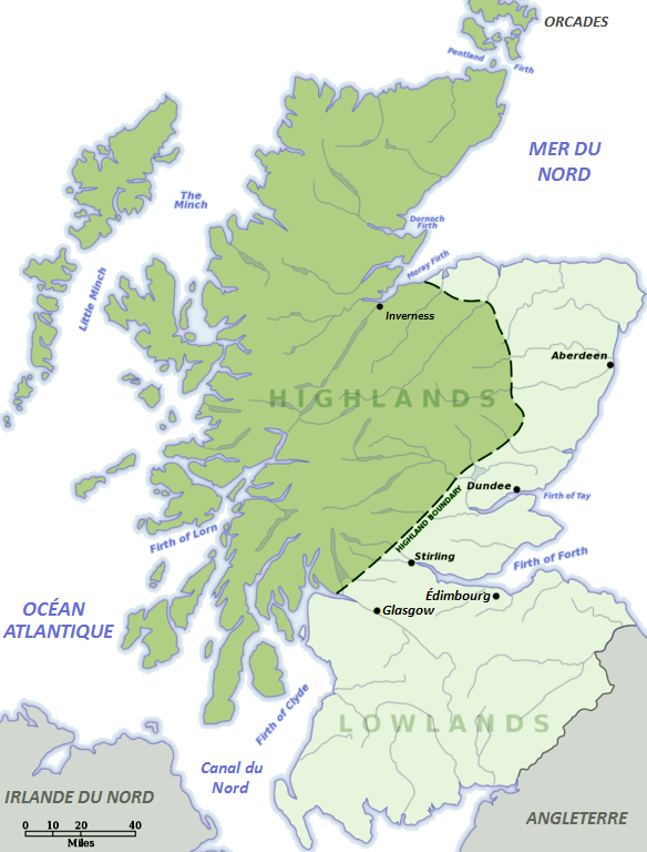 fransk översättning av Fil:Highlands lowlands.png